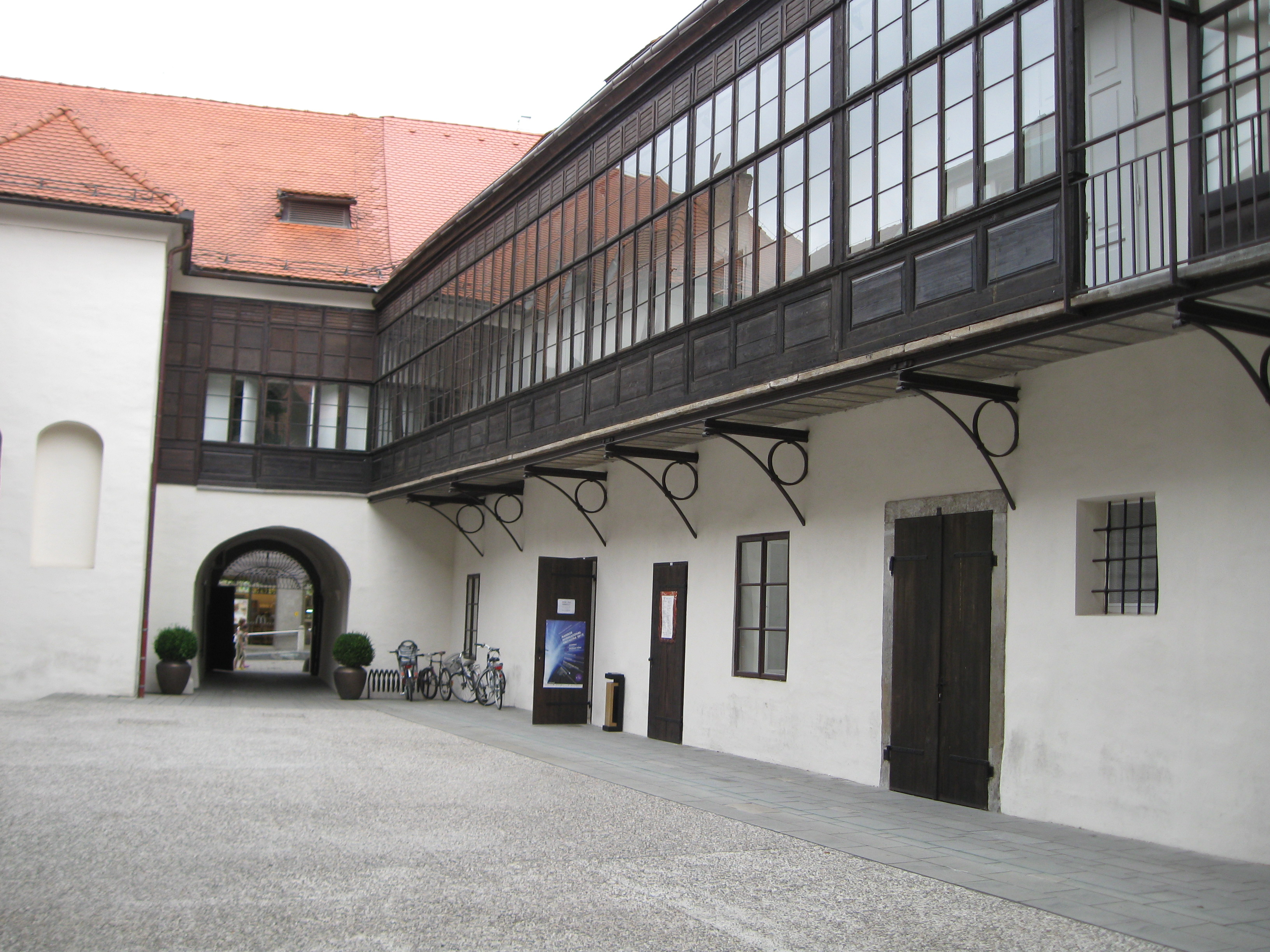 Posnetek dvorišča Vetrinskega dvora od vzhodne strani proti glavnemu vhodu.